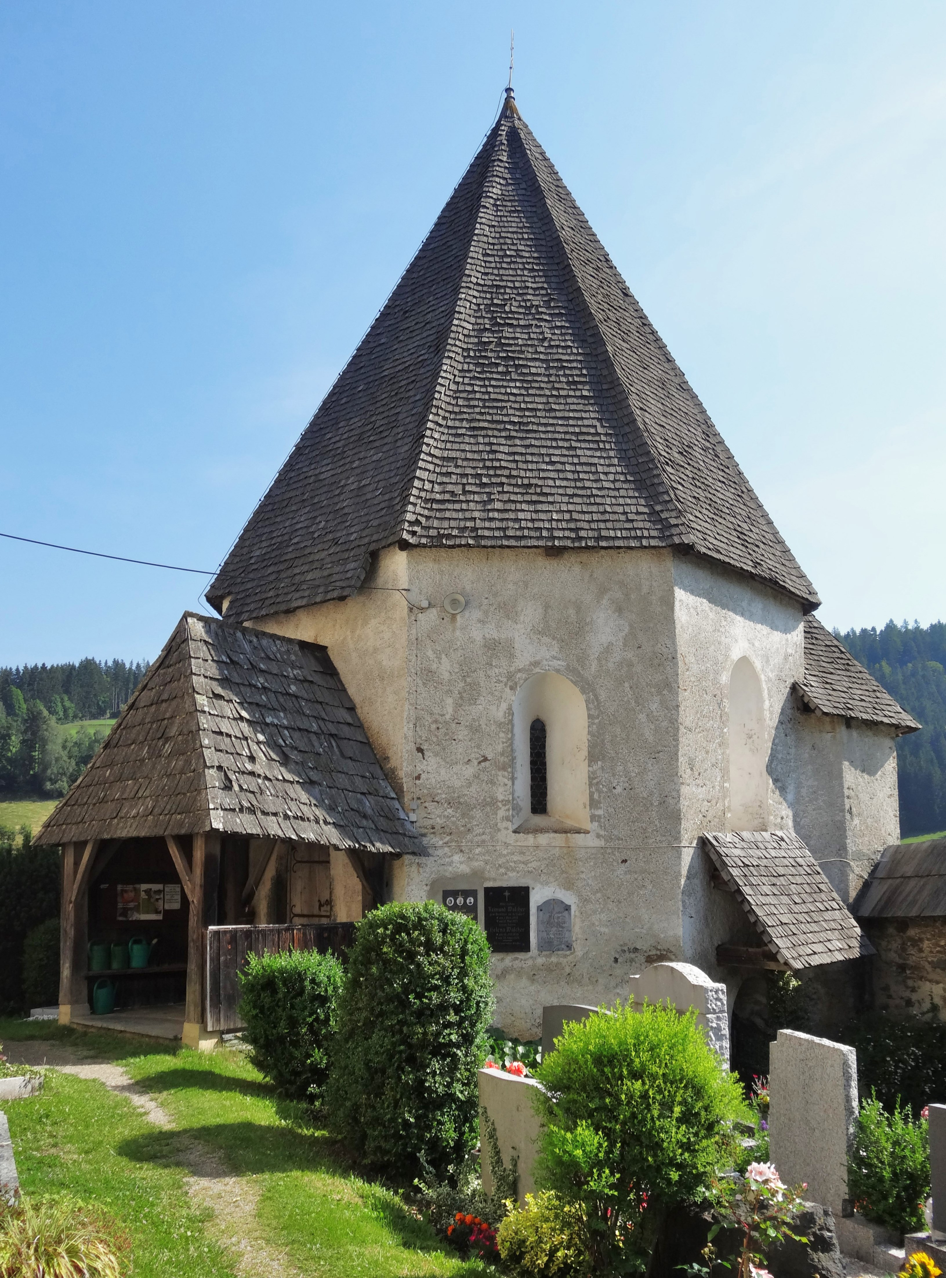 Der Karner, Friedhofskapelle Hl. Oswald (Deutsch-Griffen)